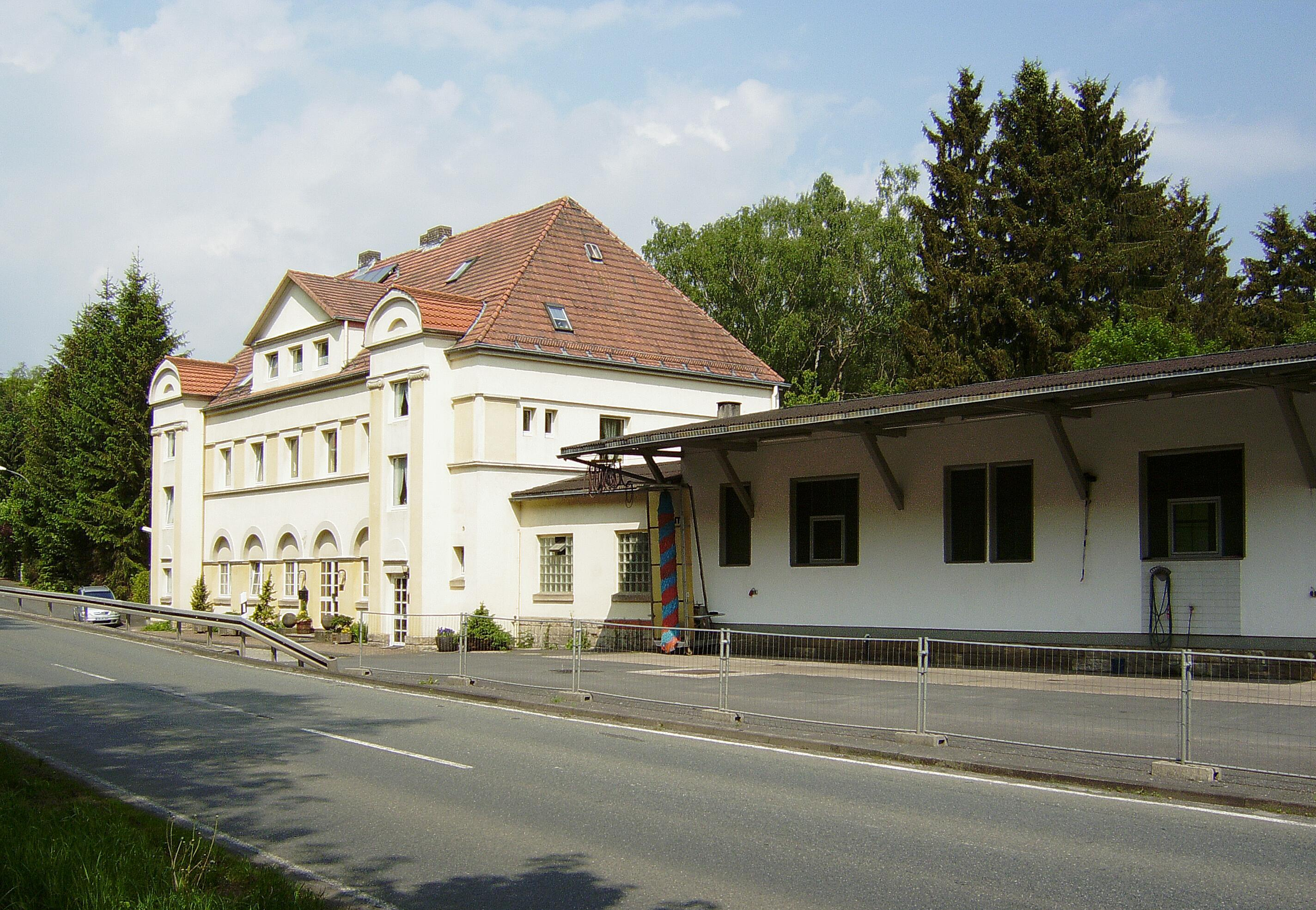 Grossalmerode - Ostbahnhof